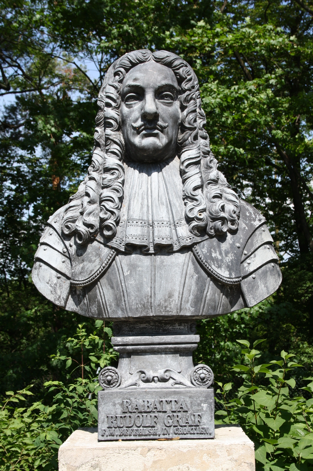 Büste in der Gedenkstätte Heldenberg (Niederösterreich)